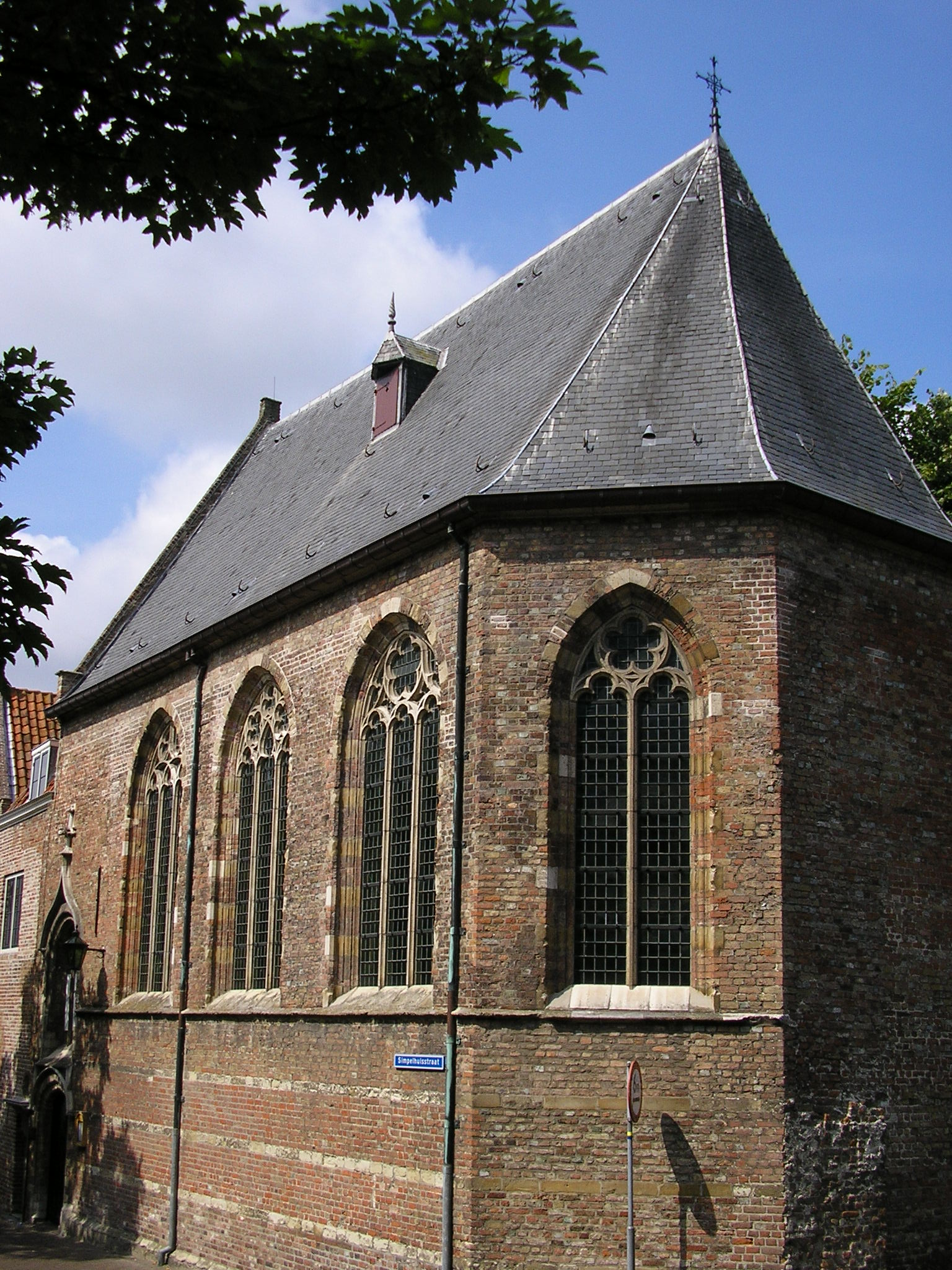 Engelse Kerk, Middelburg, Zeeland NL